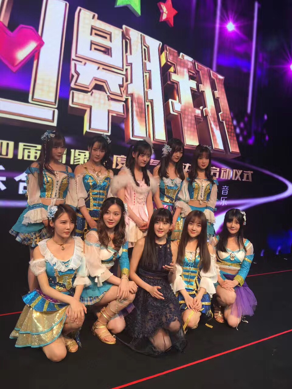 期待总决选 65日下午100，《女友家园》拍摄直播，不见不散！